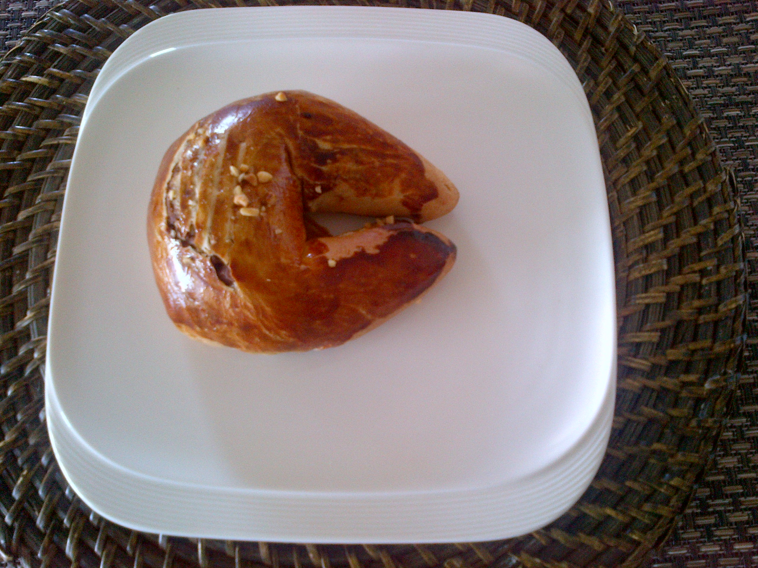 Ay çöreği, un bollo de la cocina turca que ha sido el que inspiro el cruasan.